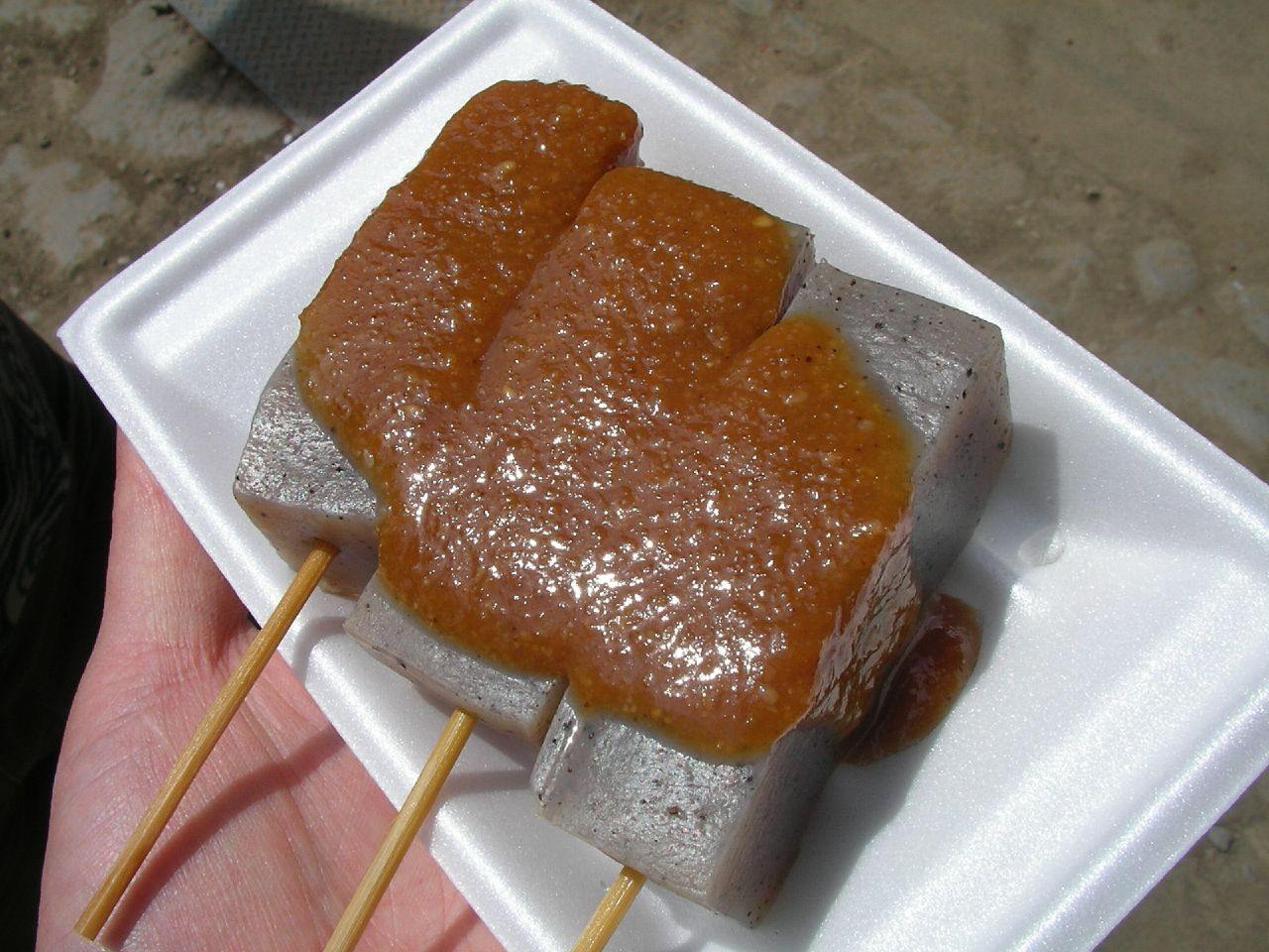 こんにゃくおでん